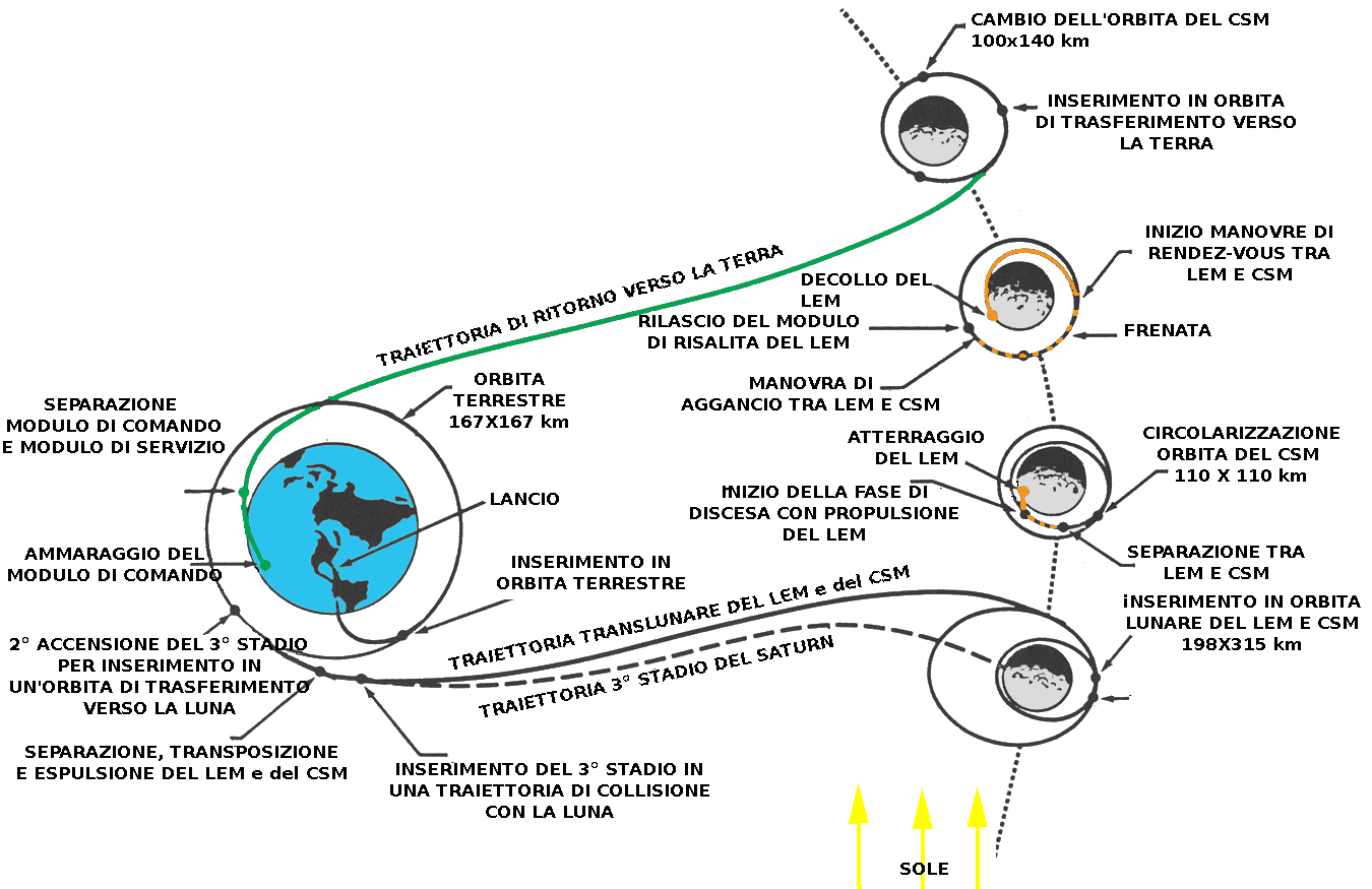 Schema della traiettoria della missione Apollo 15, tradotta in italiano